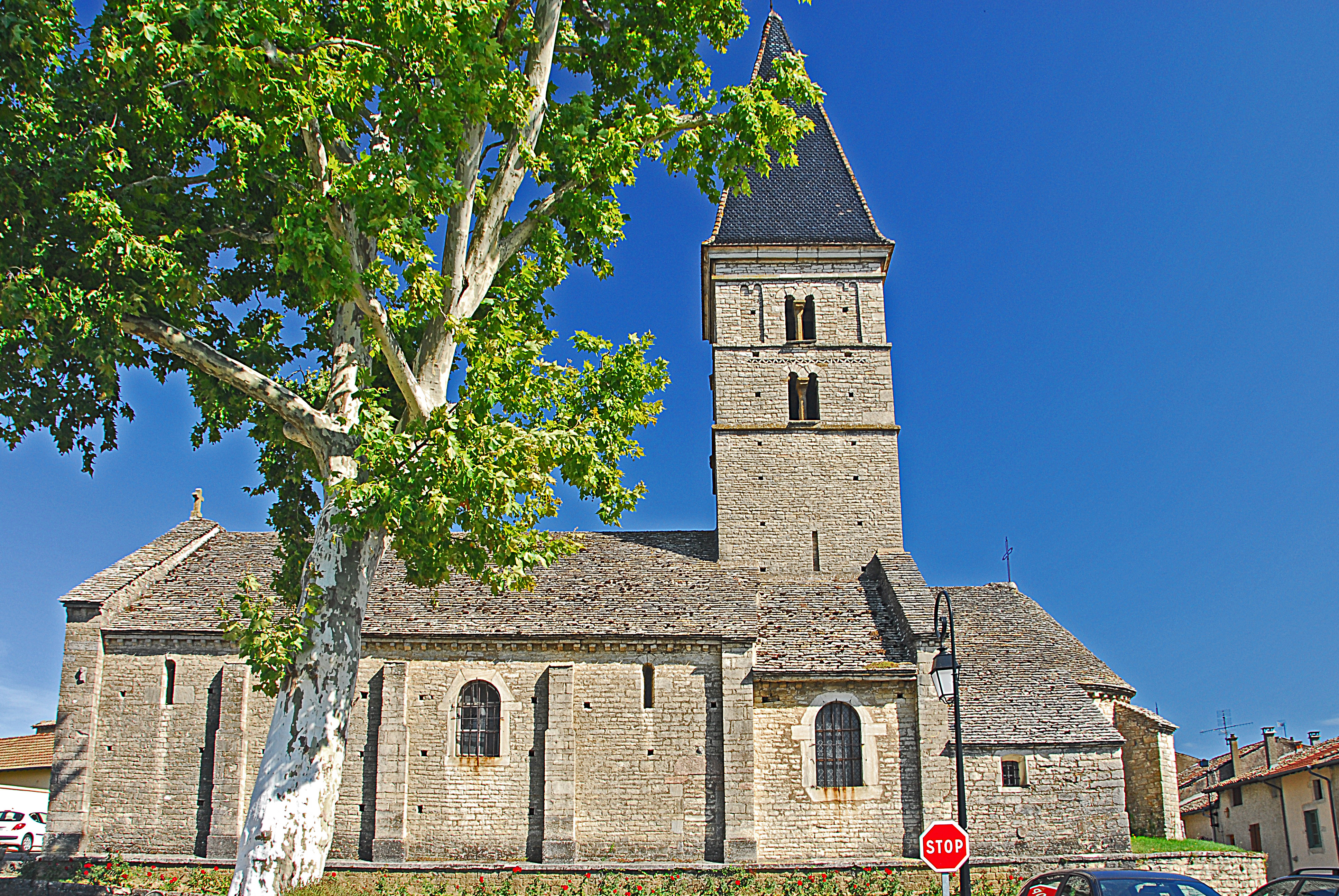 Gesamtansicht Nordseite